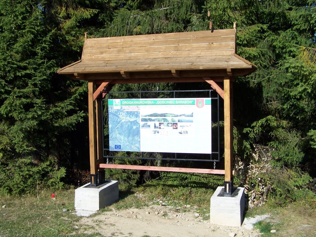 Droga Knurowska, tablica informacyjna (Gorce)